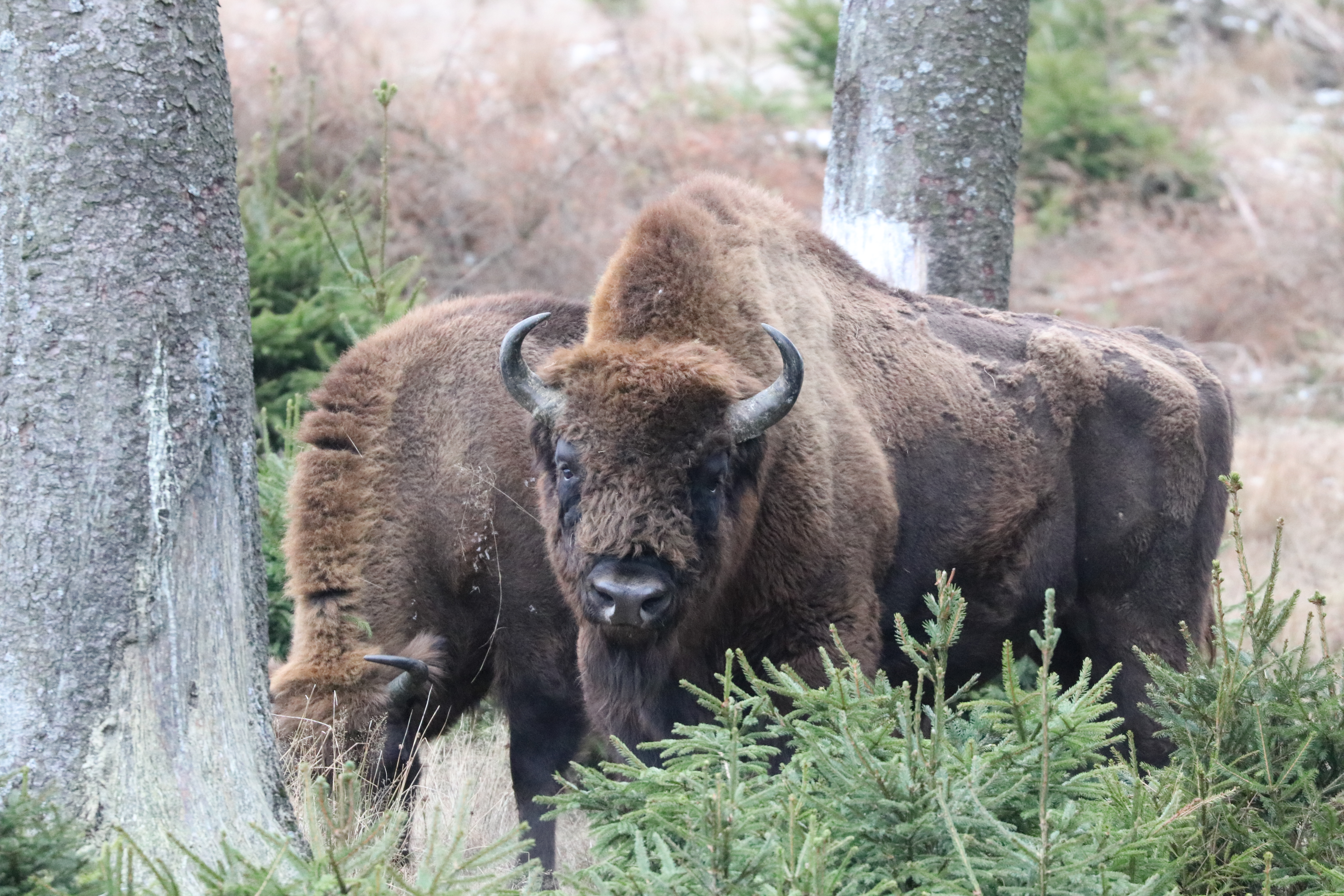 Wisente in Wisent-Wildnis am Rothaarsteig